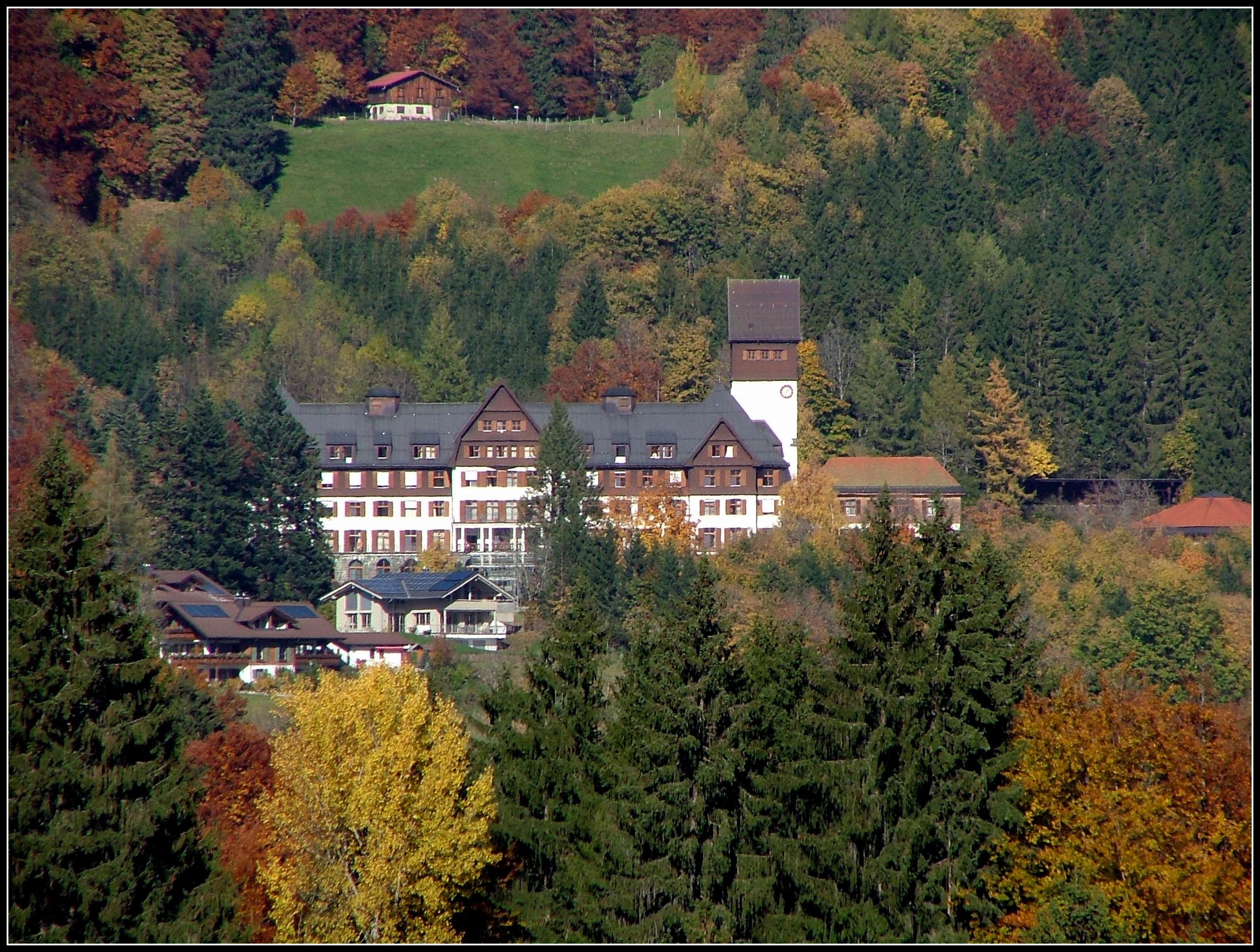 ehemalige Lungenheilstätte Wasach in Tiefenbach bei Oberstdorf im Allgäu; erbaut 1911/1916 von der Versicherungsanstalt für Schwaben und Neuburg nach Entwurf des Augsburger Architekten Jean Keller; unter Denkmalschutz